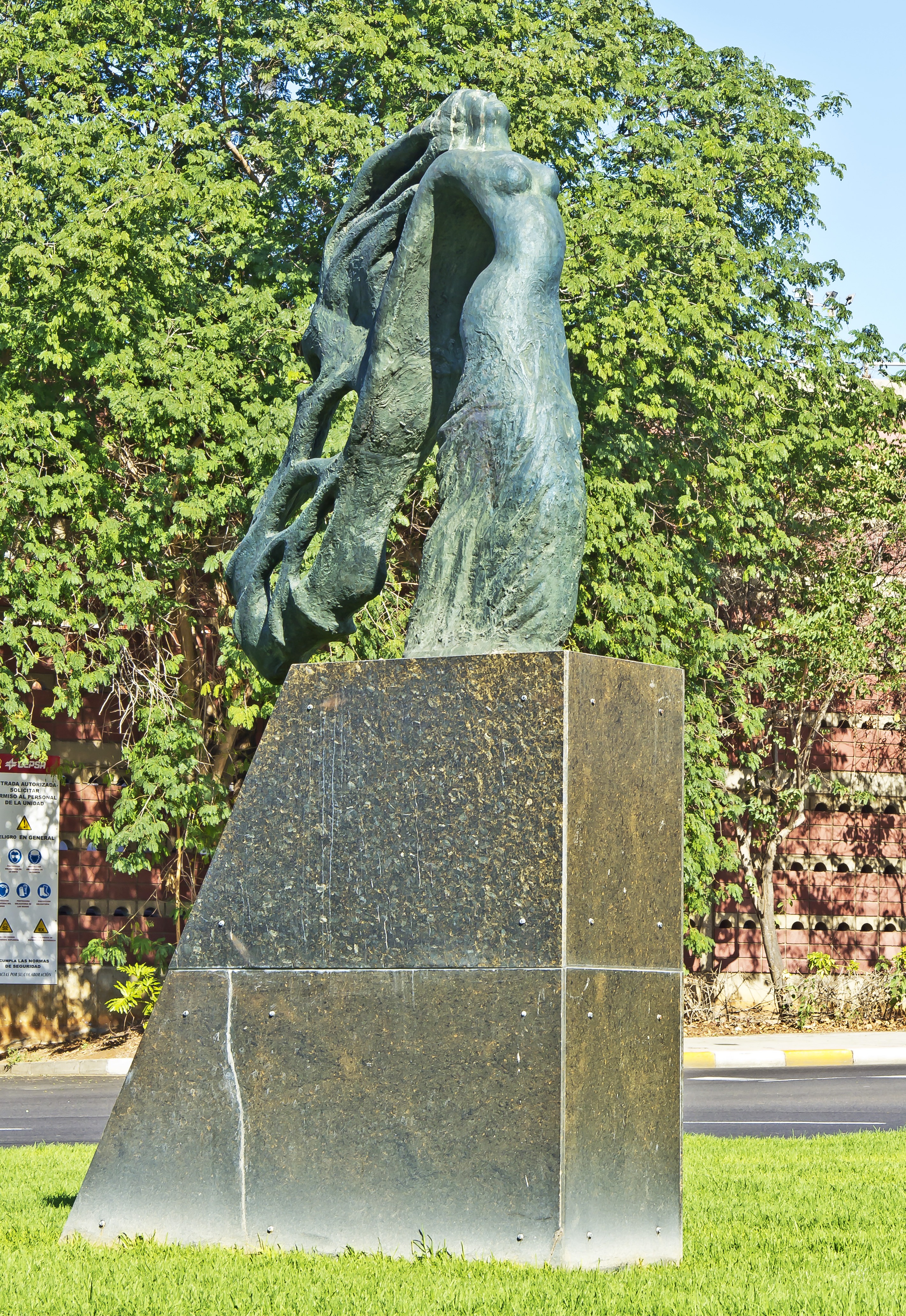 Die Plastik „Arborea“ wurde von Fernando Garcíarramos geschaffen. Sie wurde 1992 der Stadt Santa Cruz de Tenerife vom Colegio Oficial de Aparejadores y Arquitectos de Canarias (Architektenkammer) geschenkt. Im Jahr 2010 wurde sie von ihrem alten Standort auf einen Platz am Ende der TF 4 am Centro Internacional de Ferias y Congresos versetzt.